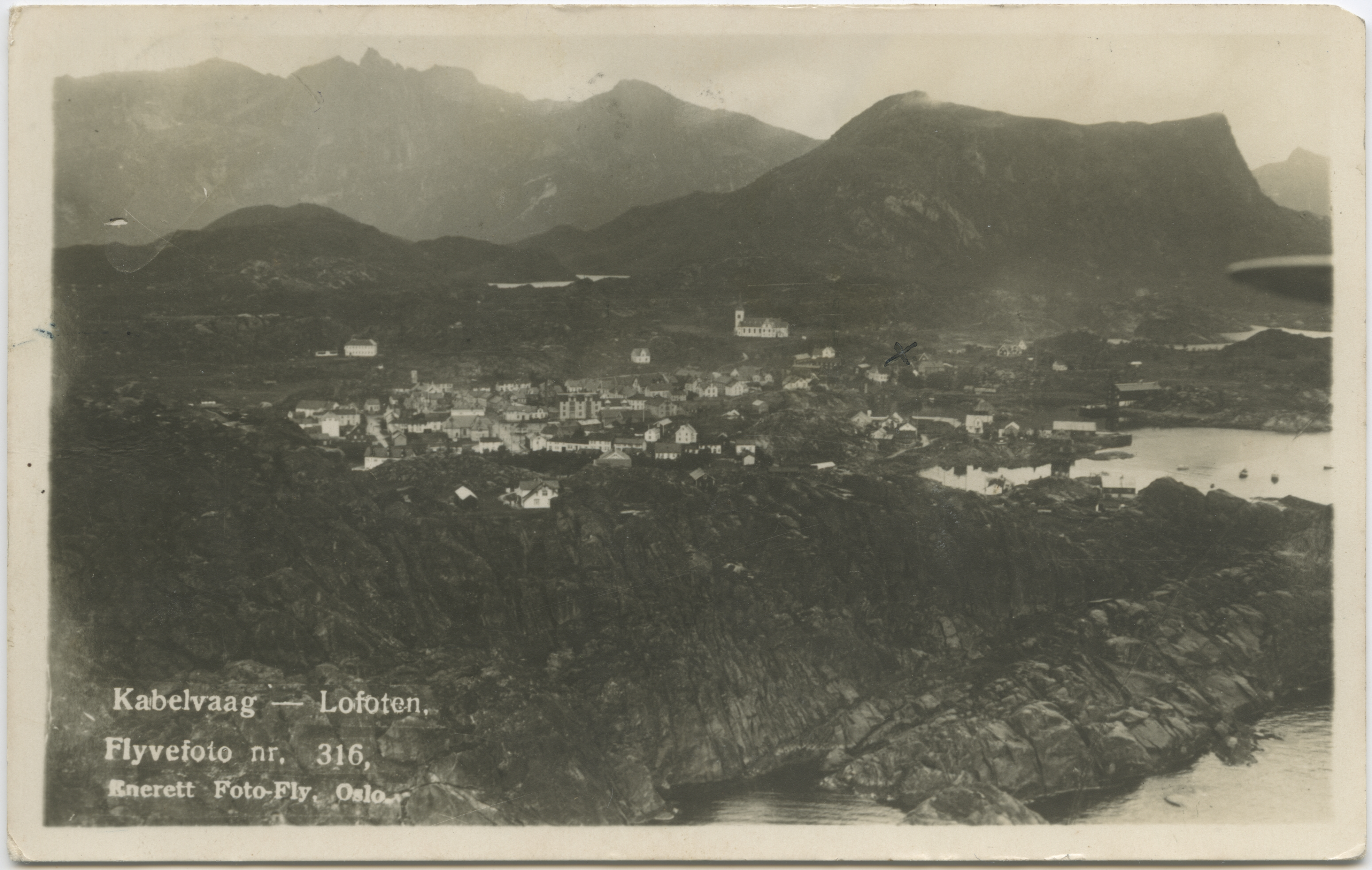 Flyfoto av Kabelvåg ca. 1930. Midt i bildet skimtes Vågan kirke ("Lofotkatedralen"). Krysset til høyre for kirka markerer en folkehøgskole. Bildet er sendt som postkort til Ivar Lund fra Knut, og er datert Finn-neset 20.12.1932. Fotograf / Photographer: Fly-Foto, Oslo Fotoeier / Photo owner: Åsen Museum og Historielag Digitalisering / Digitizing: Arne Langås Foto-ID / Photo ID: 001-0530 Hvis bildet gjengis i andre sammenhenger, oppgi Åsen Museum og Historielag, fotoeier og fotograf som kildereferanse. Har du utfyllende opplysninger? Legg gjerne igjen en kommentar nedenfor eller send e-post til . | If you re-use this photo, please refer to Åsen Museum og Historielag, the photographer and the owner of the photo. Do you have additional information? Please leave a comment or send an e-mail to .